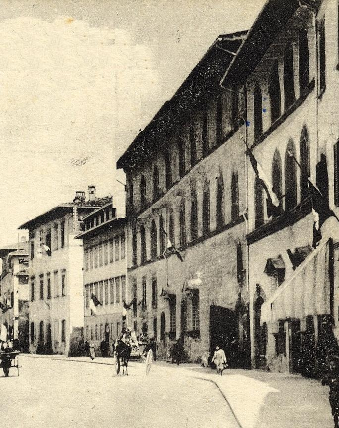 == Licenza d'uso ==